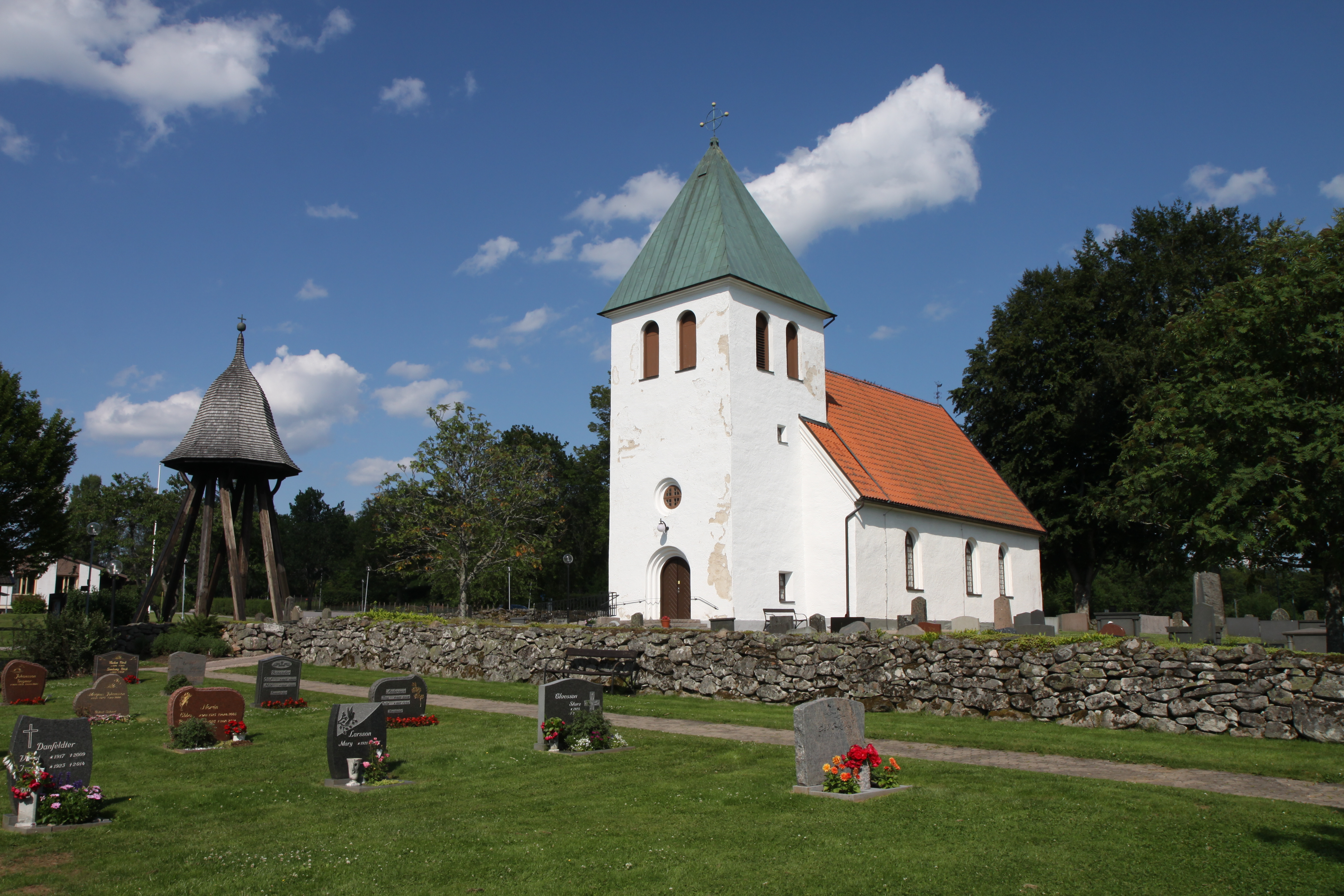 Dannike kyrka